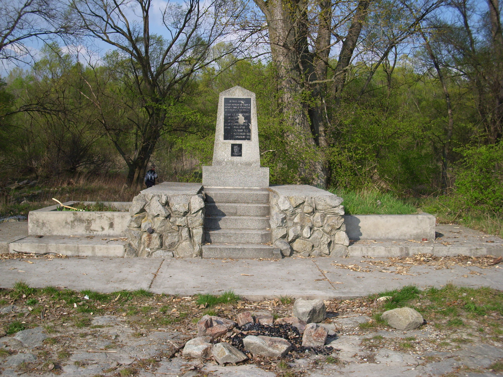 Egy háborúban, az emlékművel szemben felrobban szovjet hadihajó emlékműve a Duna partján.